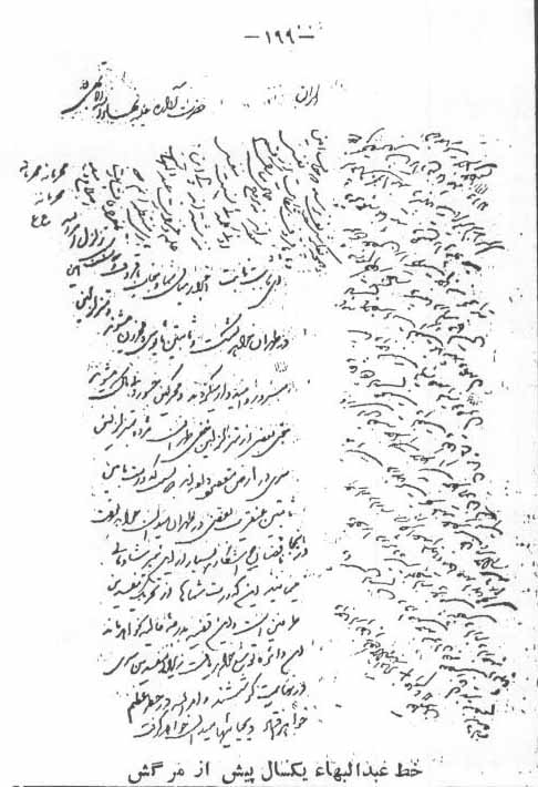 Facsimile of "Kashf Al-Hyal": P.199 Vol.3: Handwriting by AbdulBaha to AbdulHusein Ayati calls he: «حضرت آواره علیه بهاءالله الابهی»